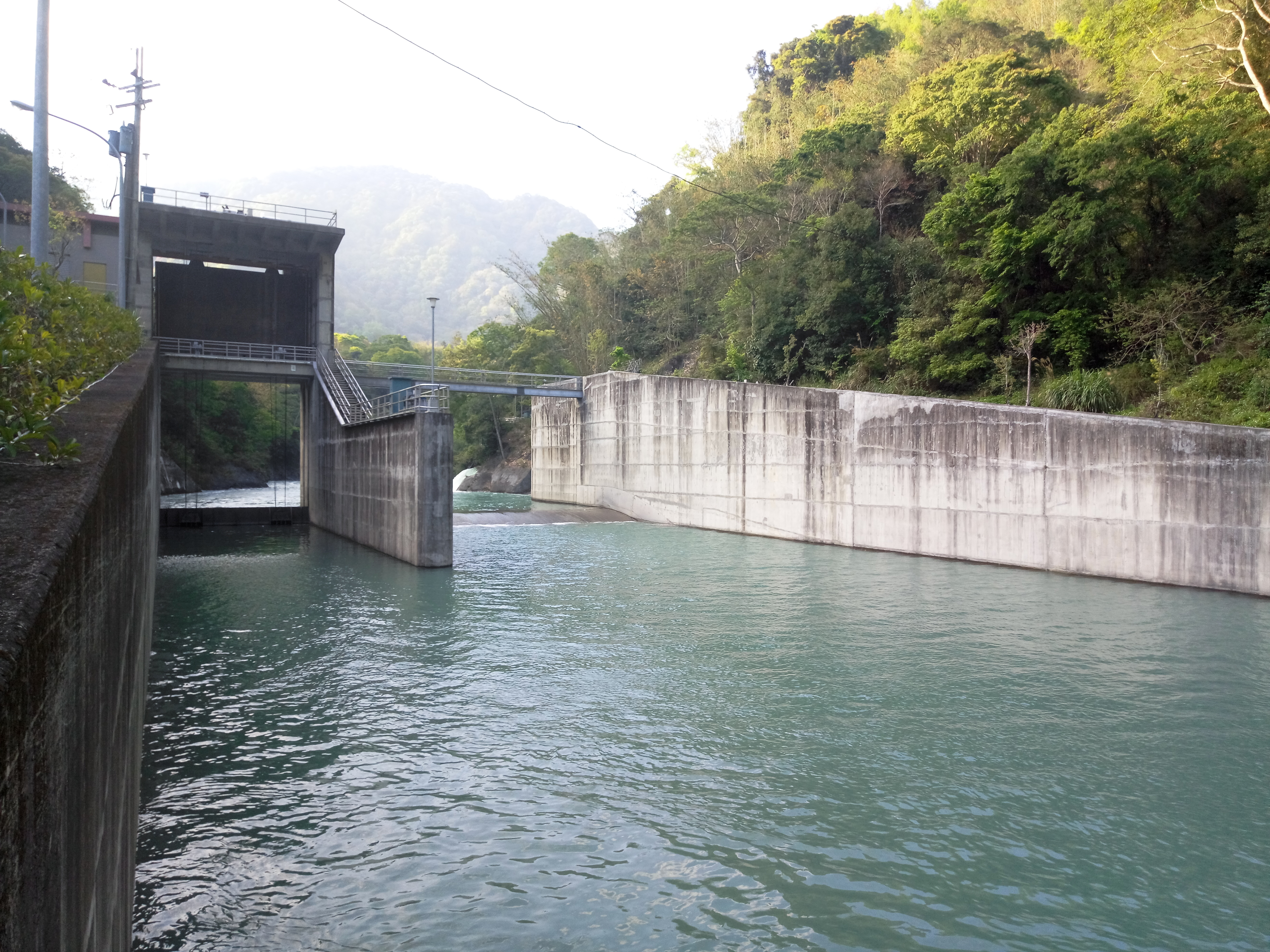 松林攔河堰正面